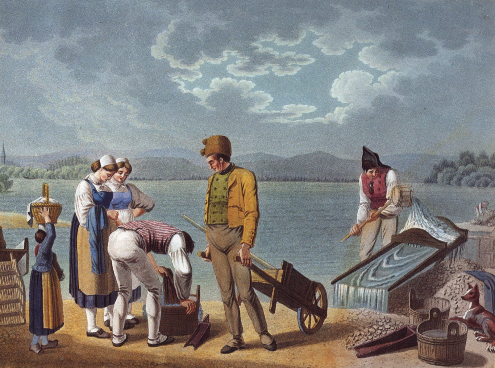 Das Goldwaschen bey Carlsruhe, from: Aloys Schreiber: Trachten, Volksfeste und charakteristische Beschäftigungen im Großherzogtum Baden, Freiburg um 1825 Seite des Exemplars der Badischen Landesbibliothek, 86 C 13 RH